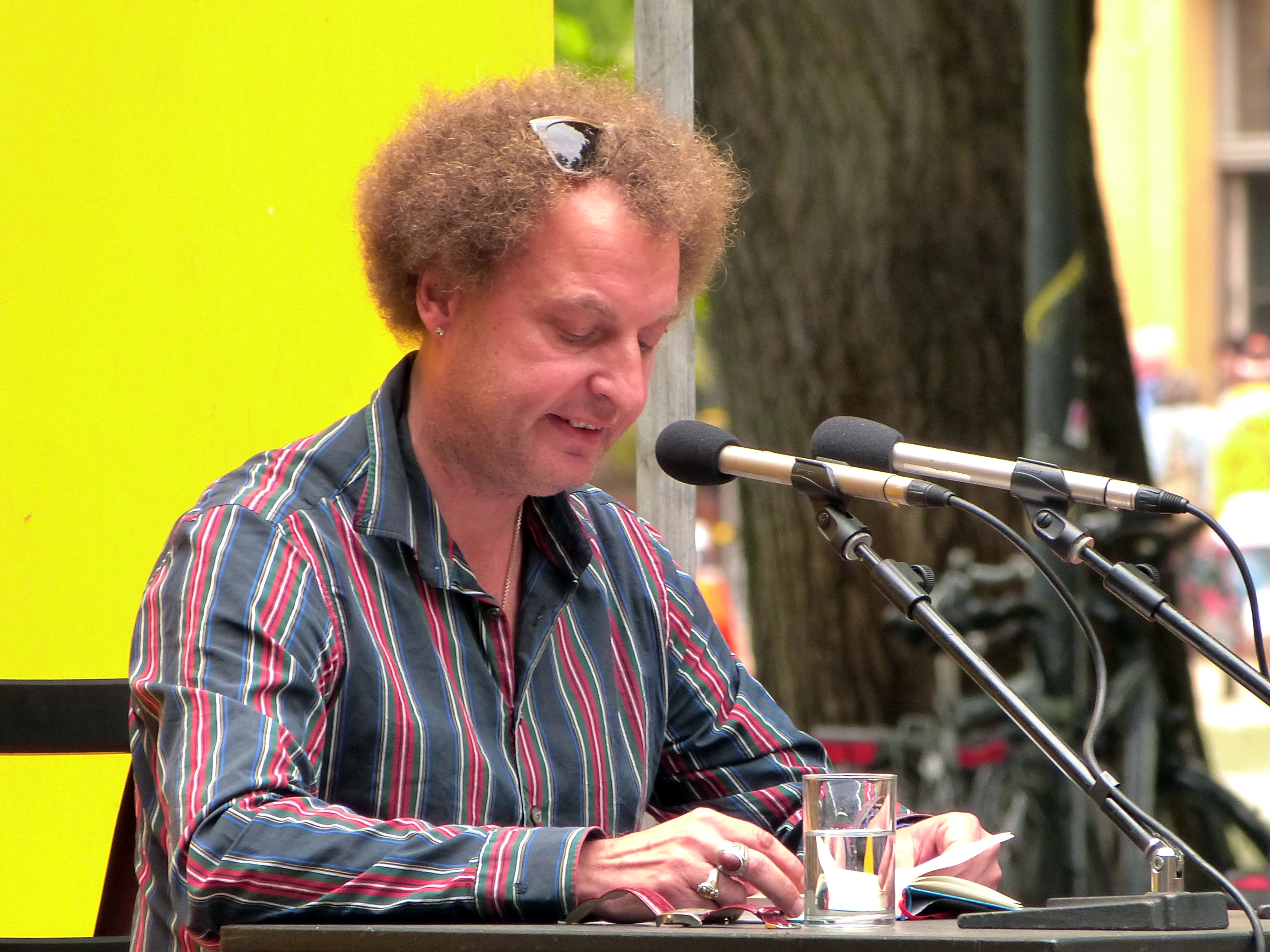 Der Schriftsteller Jan Peter Bremer bei einer Lesung auf dem Erlanger Poetenfest 2019.